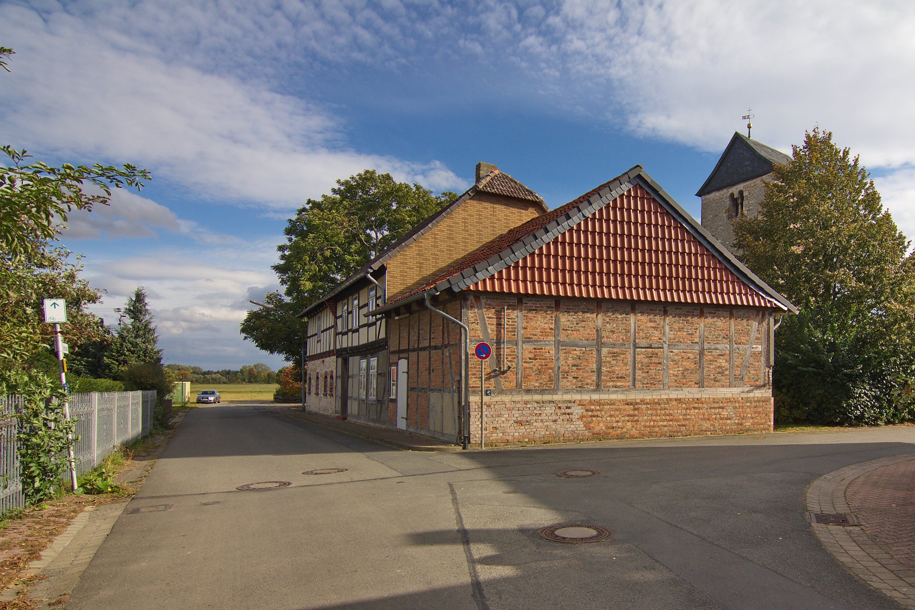 Ortsblick in Dorstadt, Niedersachsen, Deutschland.